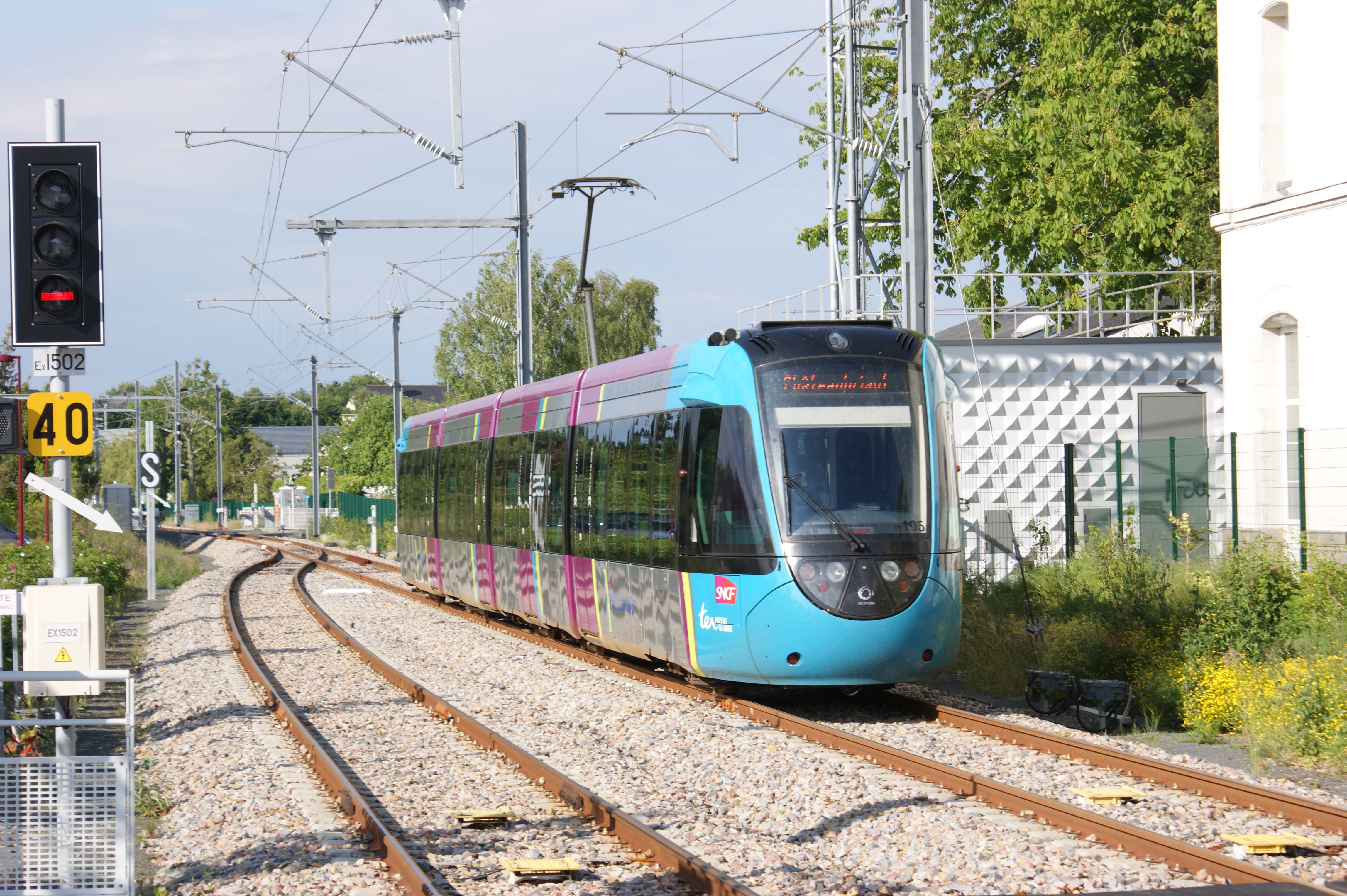 Gare de Sucé-sur-Erdre, le tram train n°105 pour Châteaubriant rejoint la voie unique.